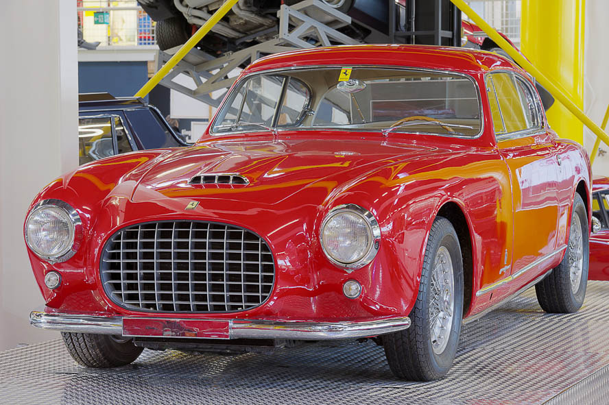 Auto & Technik Museum Sinsheim,Ferrari 342 America